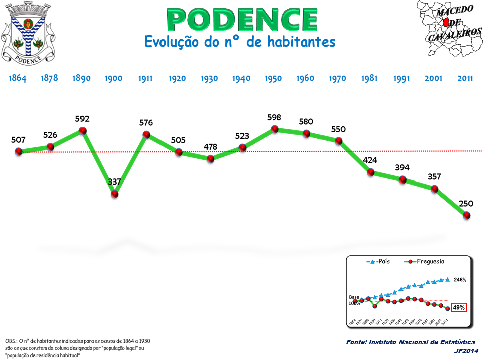 Evolução da População 1864 / 2011